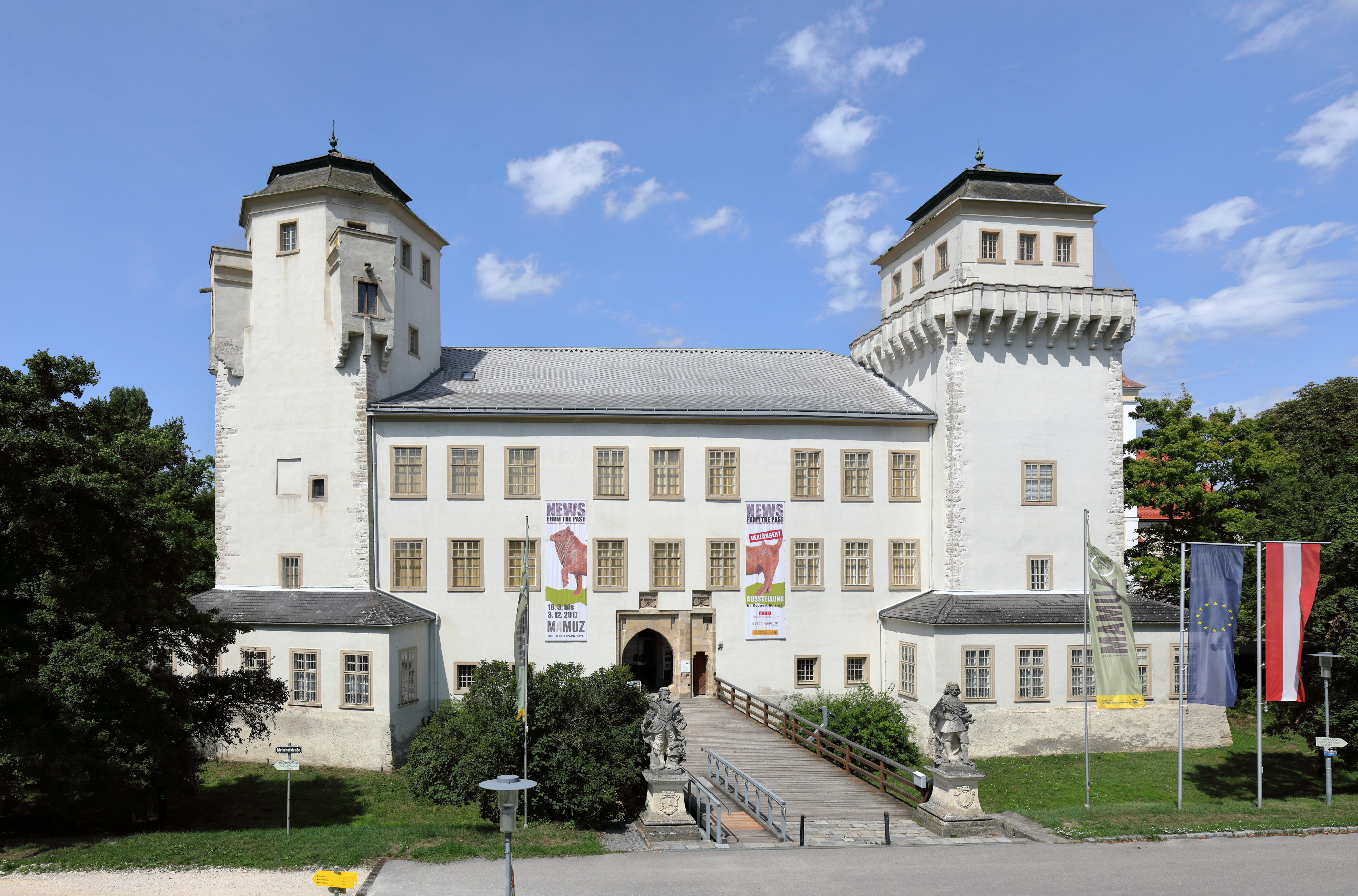 Südansicht des Schlosses Asparn in der niederösterreichischen Marktgemeinde Asparn an der Zaya.Ursprünglich eine vierflügelige Wasserburg mit 2 mächtigen Ecktürmen im Süden. 1645 durch die Schweden zerstört und 1651 teilweise Neuerrichtung. 1717 erfolgte eine Umgestaltung und 1820 wurde der Nordflügel abgetragen.Am 5. Juni 1970 wurde im Schloss ein Urgeschichtliches Museum eröffnet. Um 2012/2014 erfolgte der Zusammenschluss mit dem Museumszentrum Mistelbach zum Mistelbach-Asparn-MUseumsZentrum (MAMUZ).